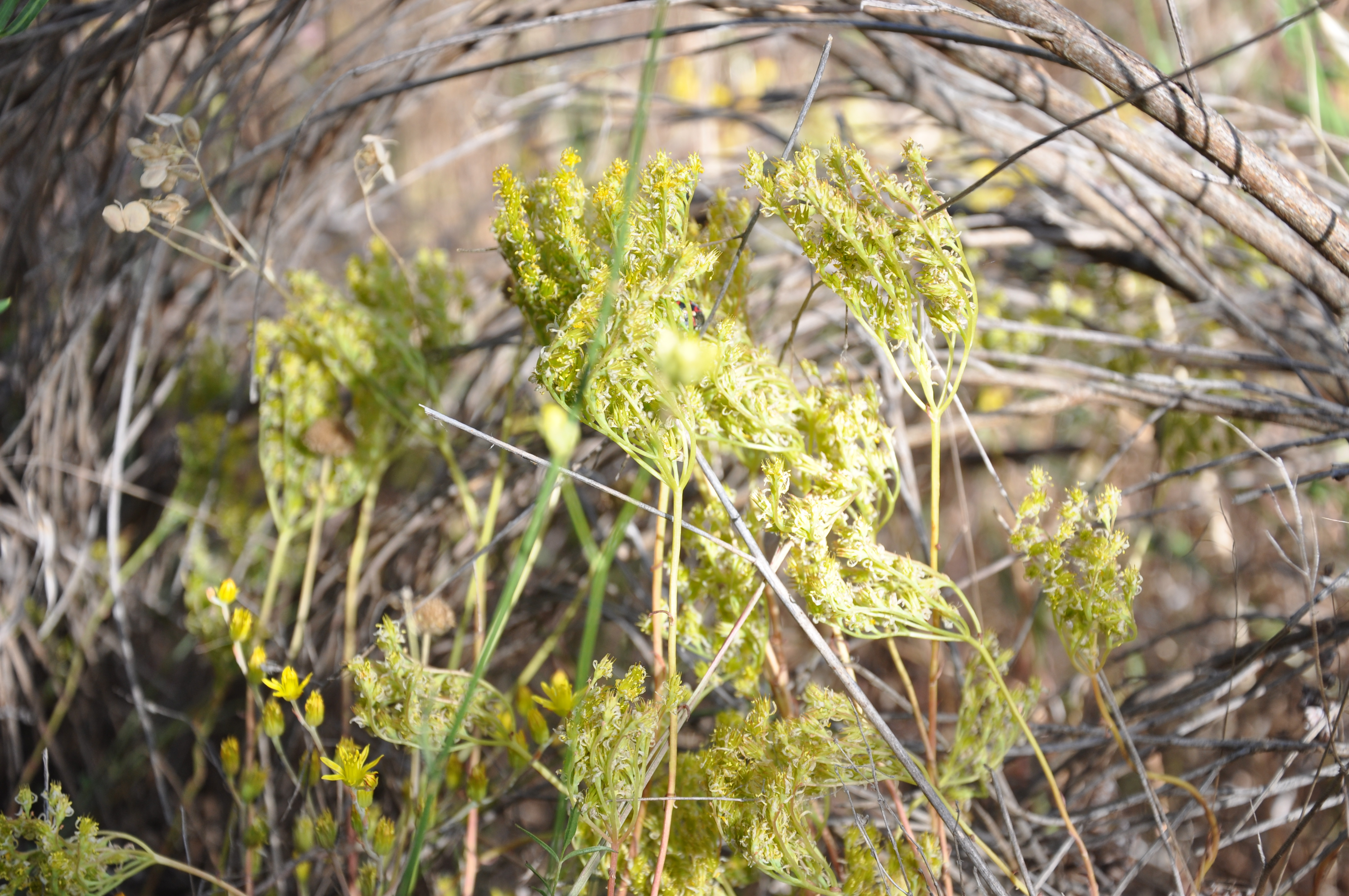 Sedo (Sedum forsterianum), Guareña-La Torre (Ávila), España.